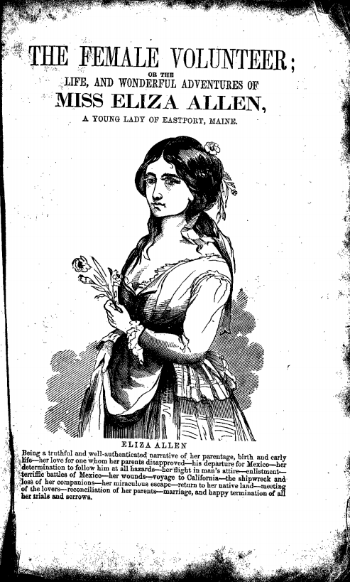 אלייזה אלן